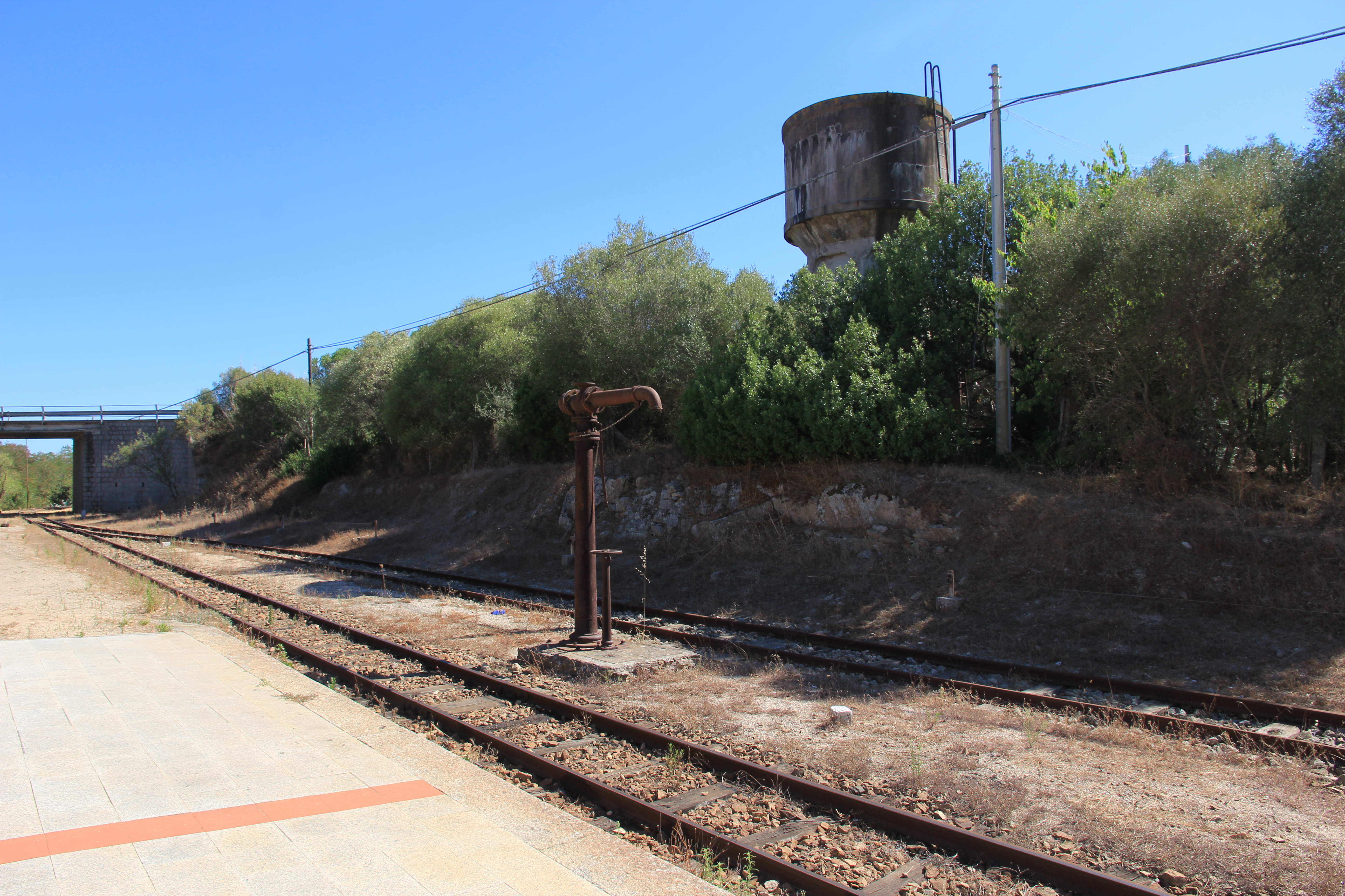 Arzachena, stazione ferroviaria